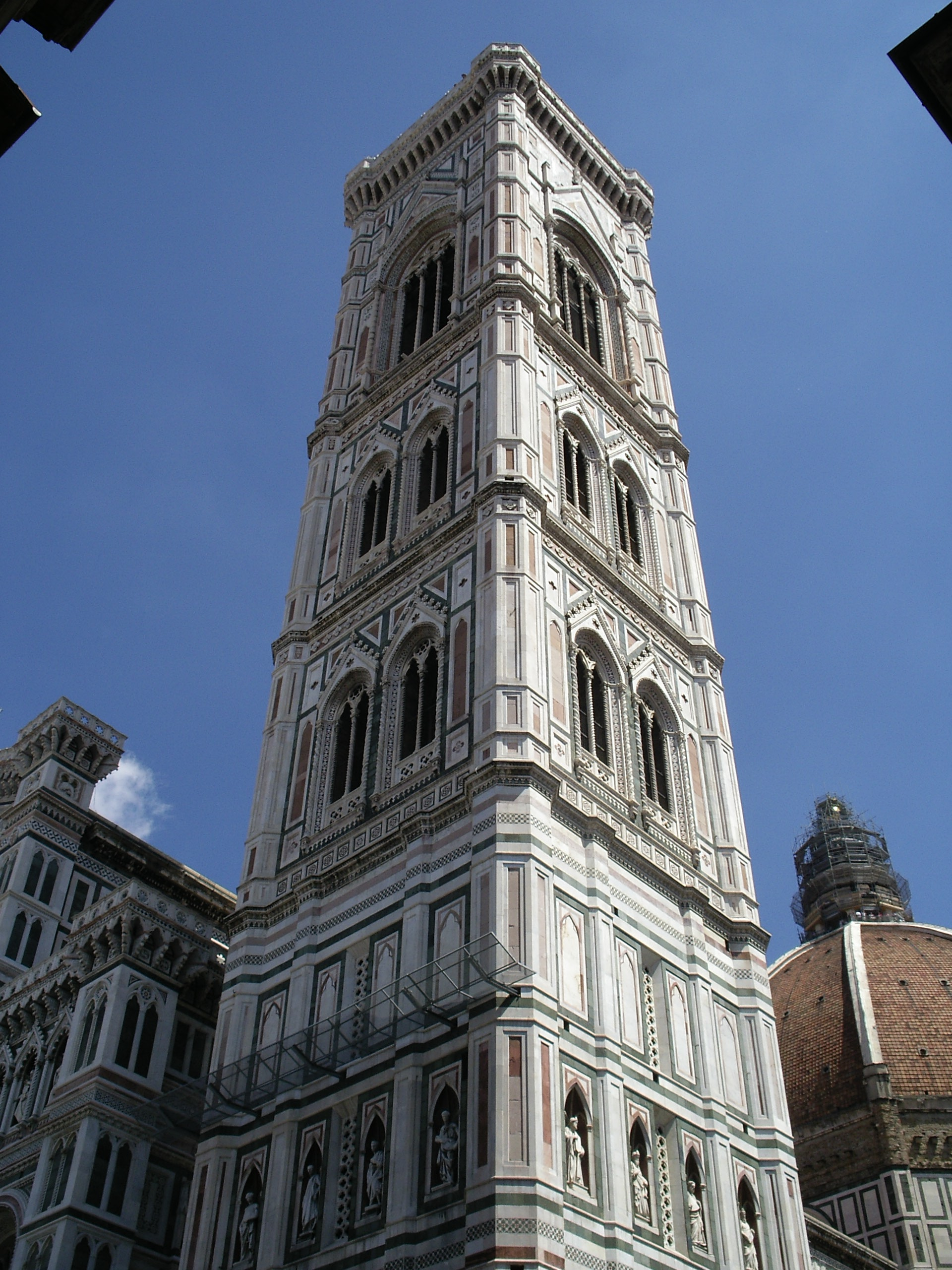 Campanile del Duomo de Florencia, obra de Giotto